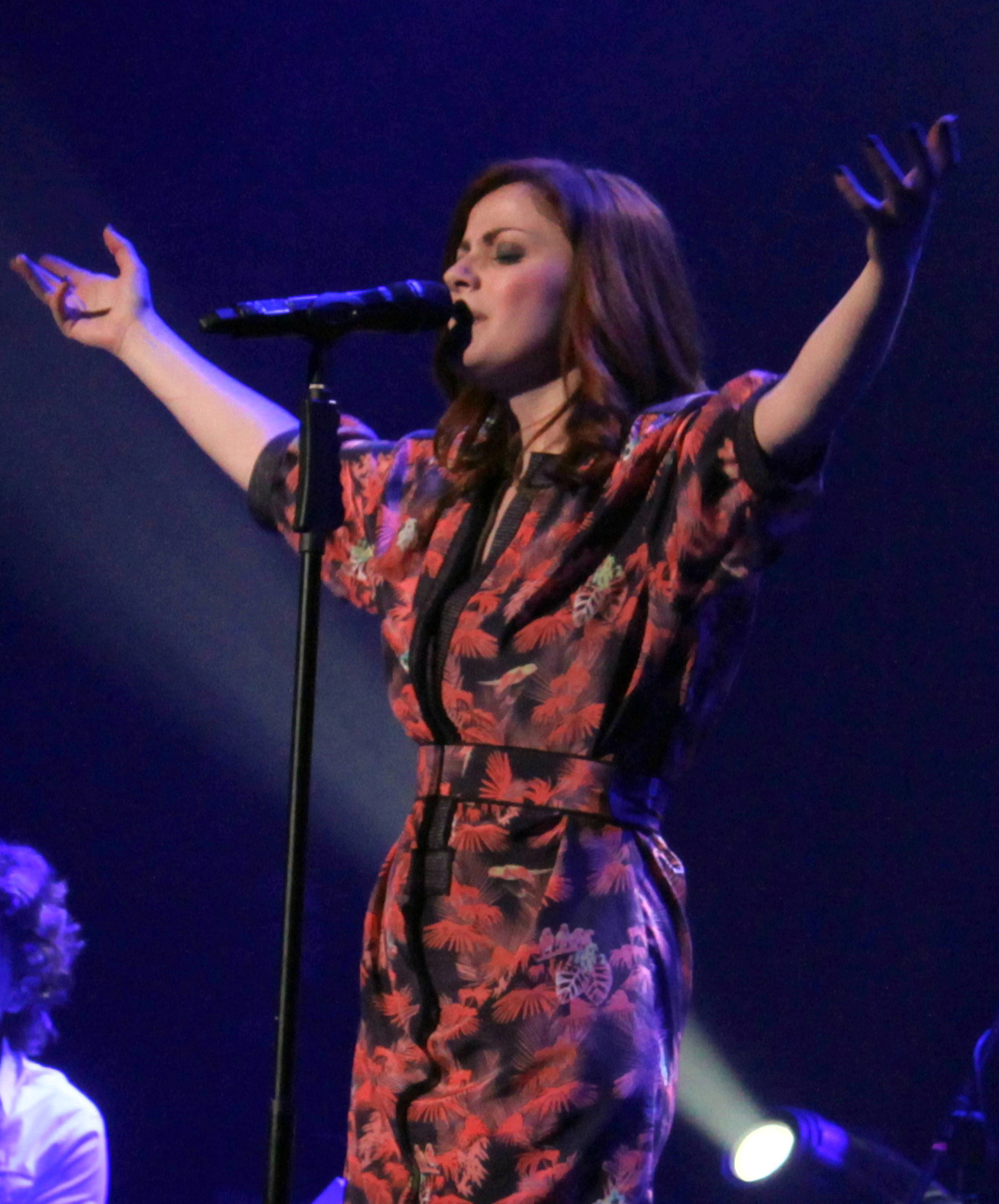 Annalisa Scarrone durante un concerto presso il Teatro Nazionale a Milano il 3 maggio 2013.